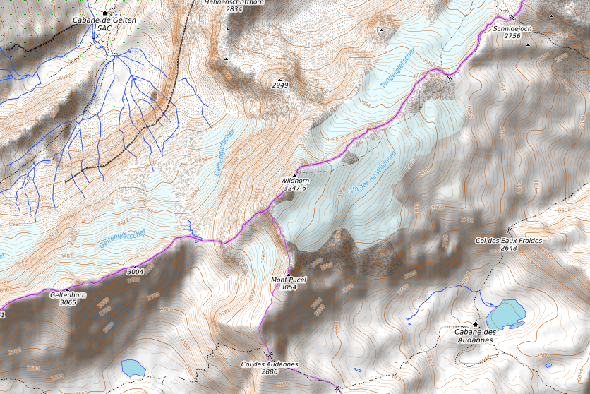 carte réalisée sur umap This map may be incomplete, and may contain errors. Don't rely solely on it for navigation.